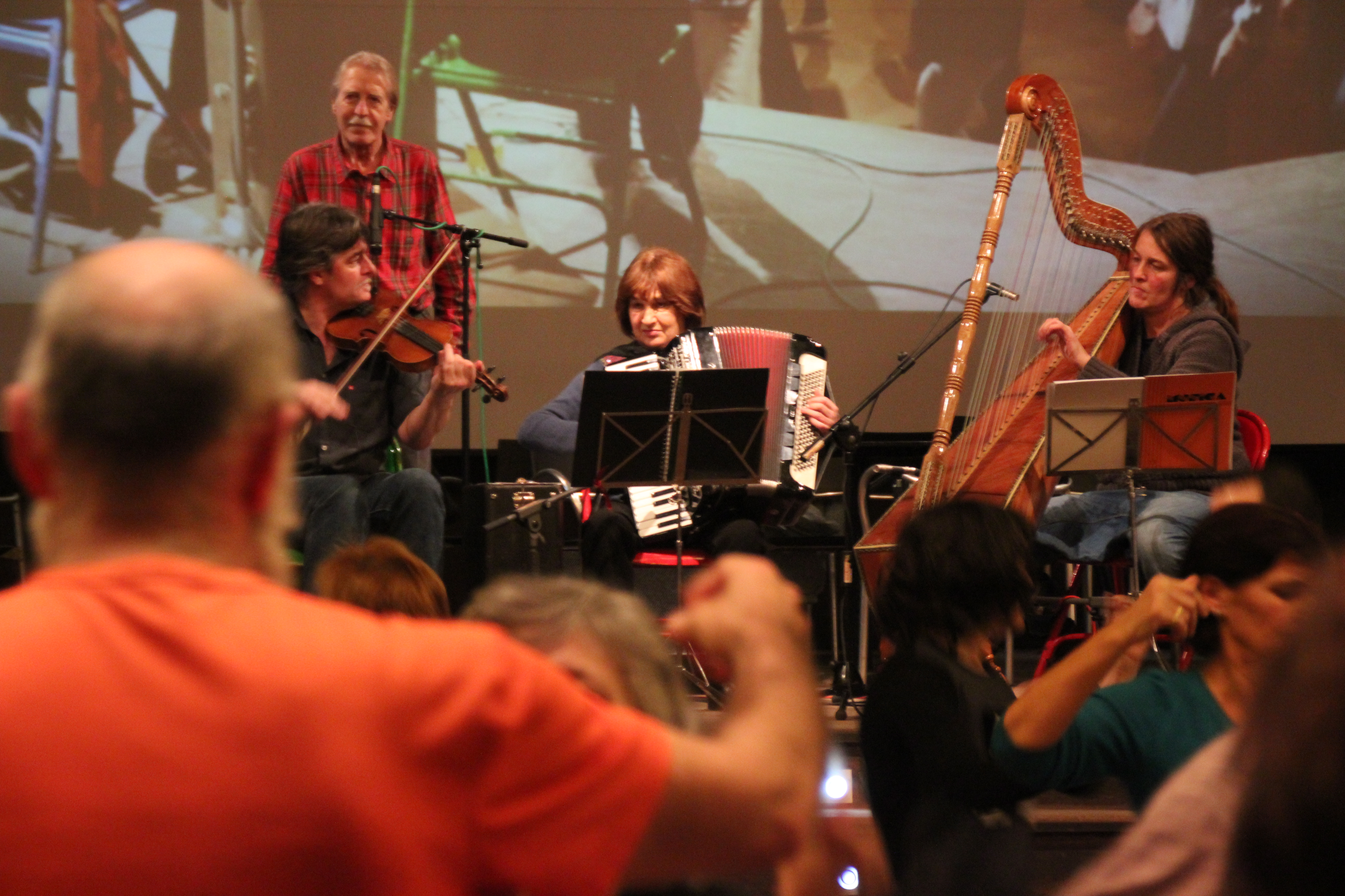 Marian Arregi Sarasola, Juan Antonio Urbeltz Navarro, Maider Urbeltz Arregi eta Mikel Urbeltz Arregi